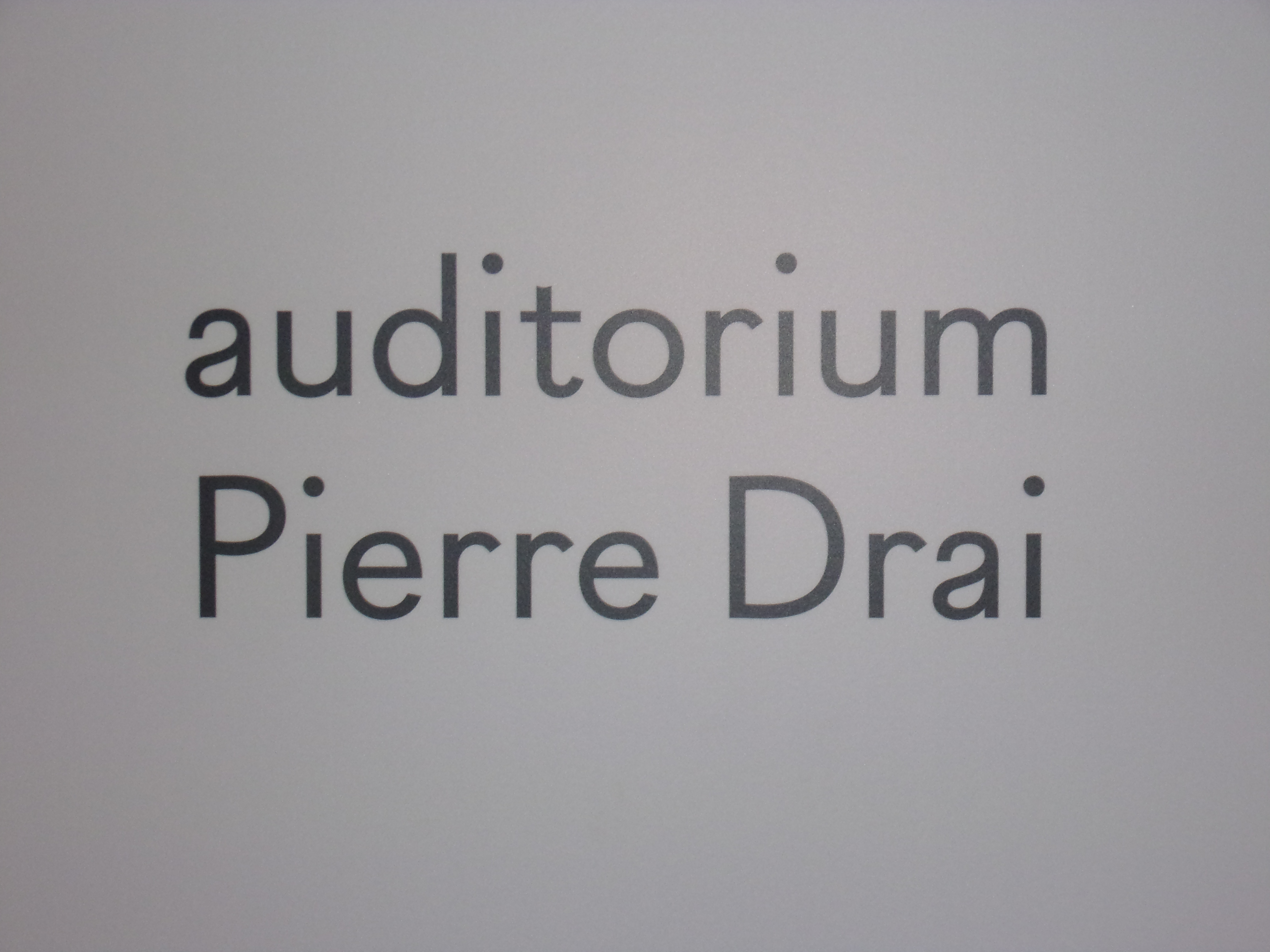 Plaque de présentation de l'auditorium du Tribunal de Paris (quartier des Batignolles). Photo prise le 16 avril 2019.